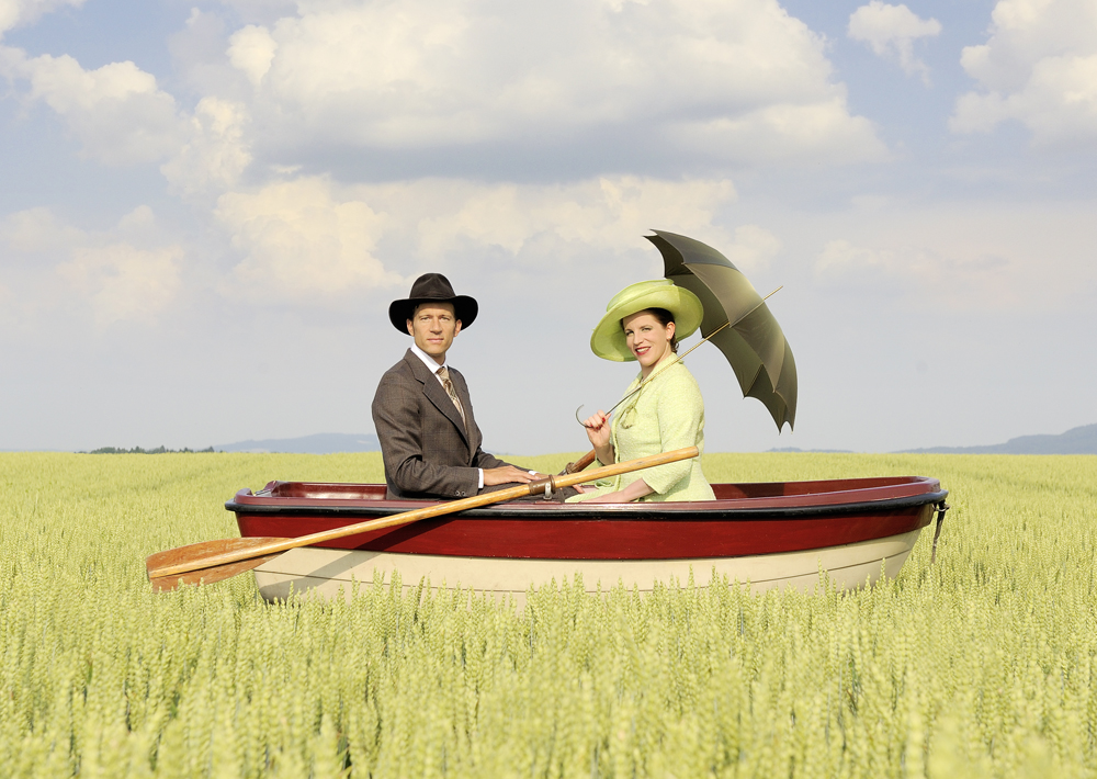 schön&gut, "Der Fisch, die Kuh und das Meer"